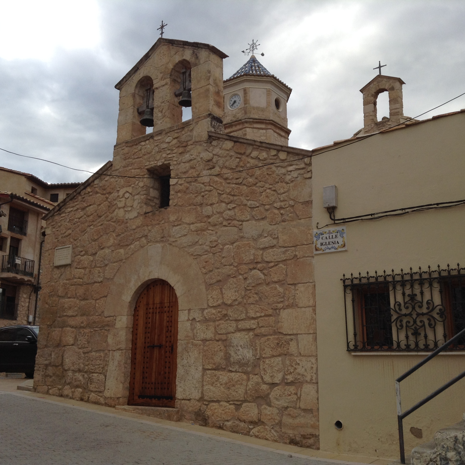 Església de la Santíssima Trinitat de Casas Altas, de principis del segle XVII 09.087-001.